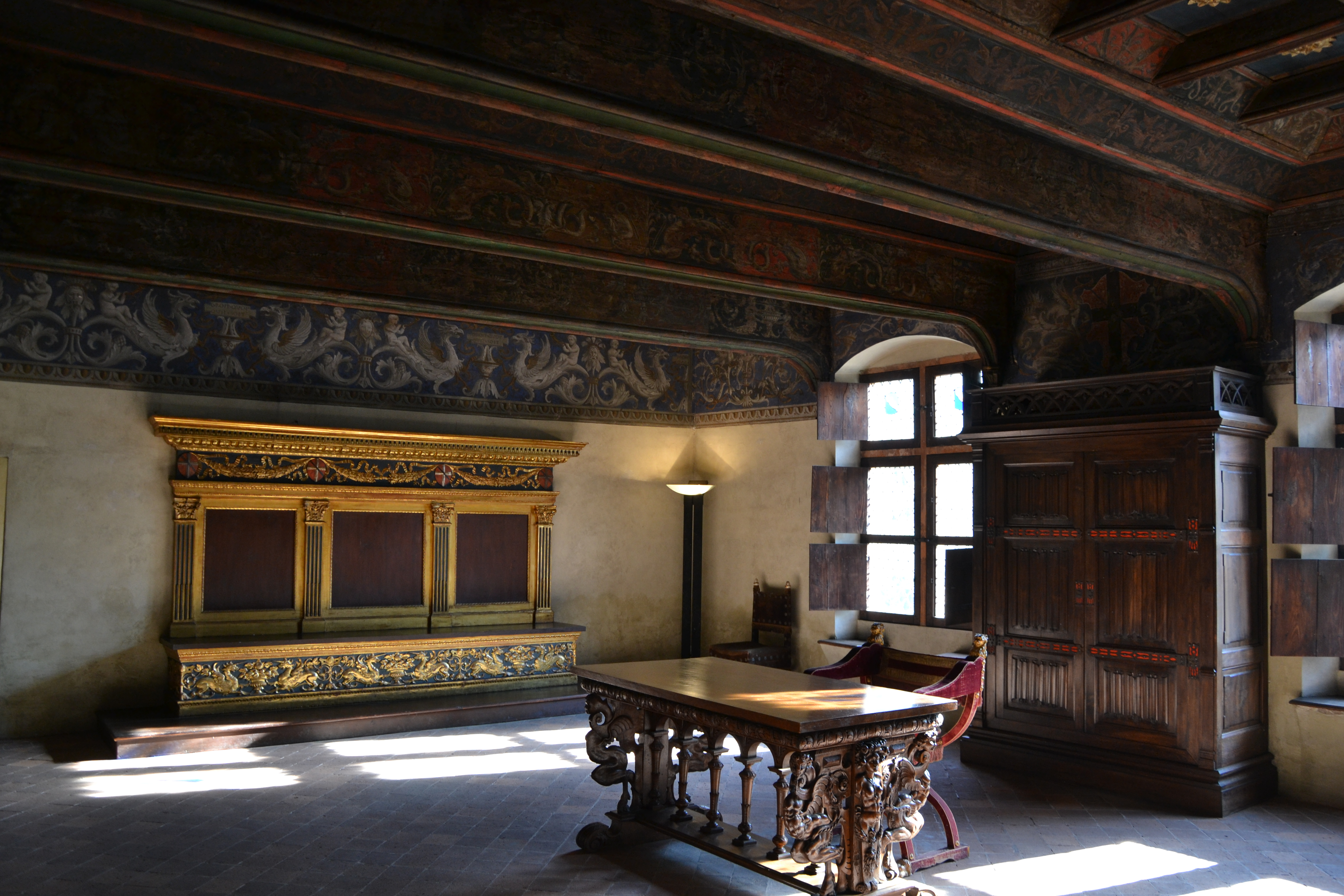 sala detta "degli Acaja"